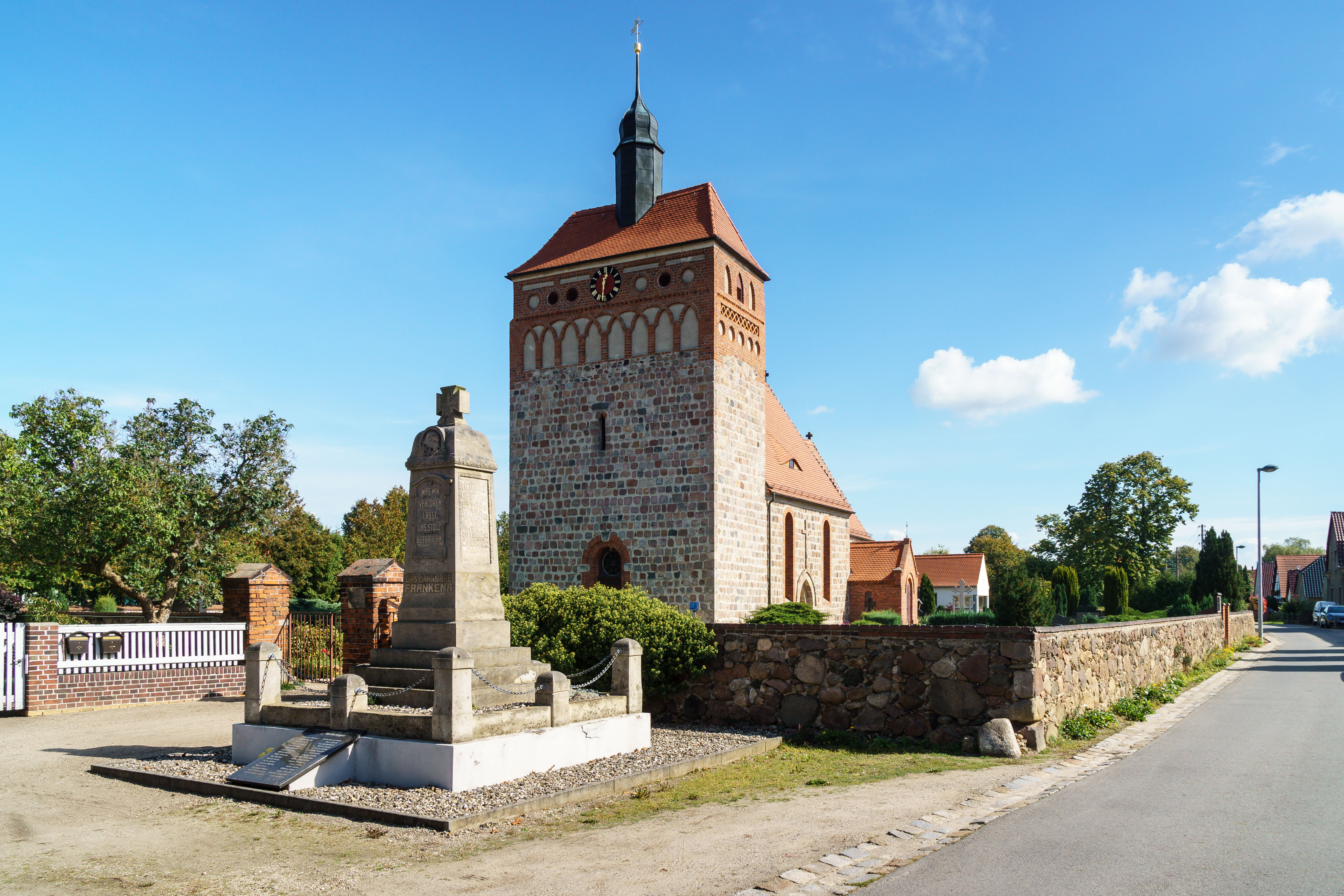 Dorfkirche Am Mühlenfließ 6 in Doberlug-Kirchhain OT Frankena